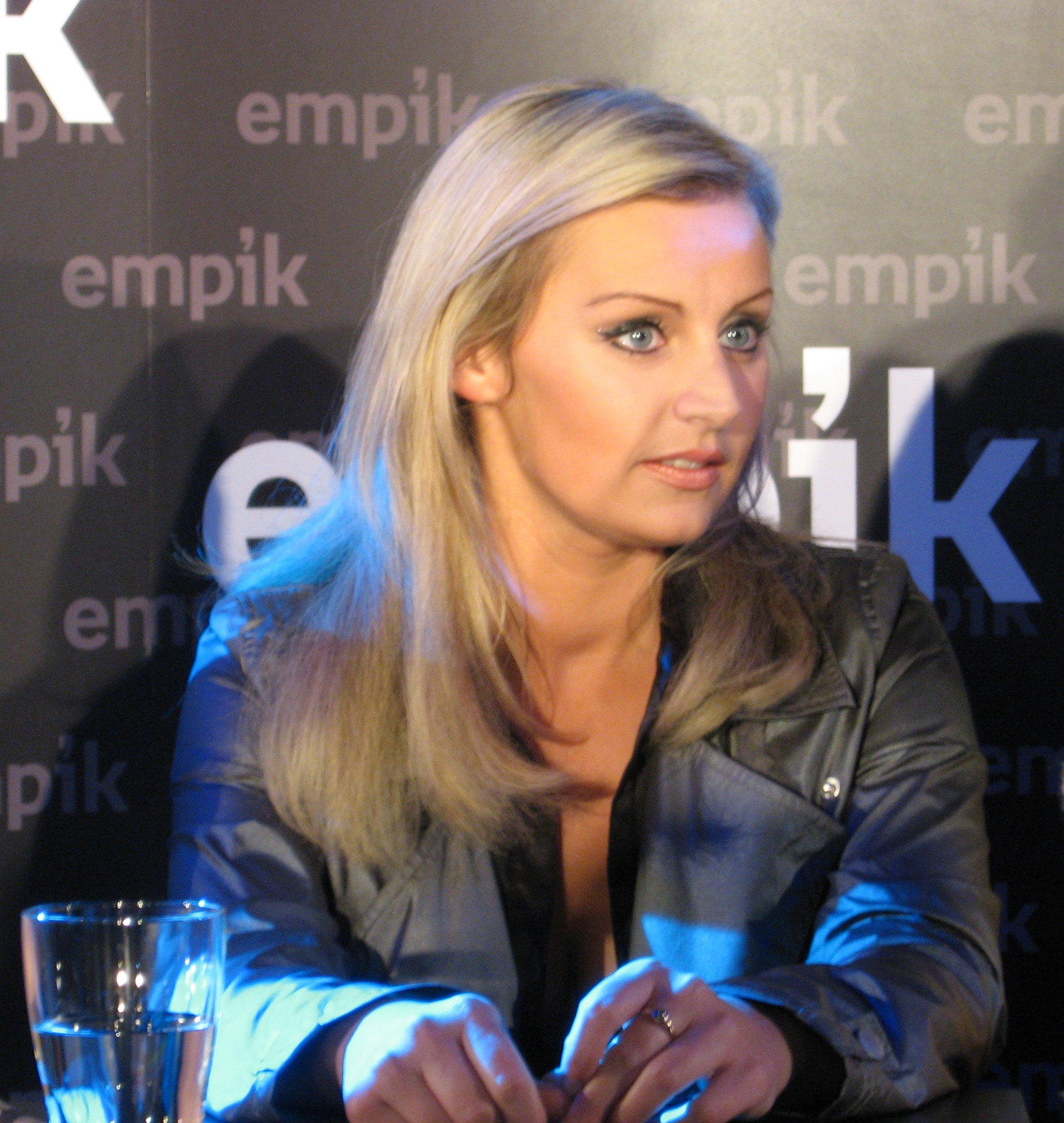 Zespół Bajm podpisuje swoją najnowszą płytę Ballady 2 w Salonie Empik Junior w Warszawie (7 kwietnia 2008).